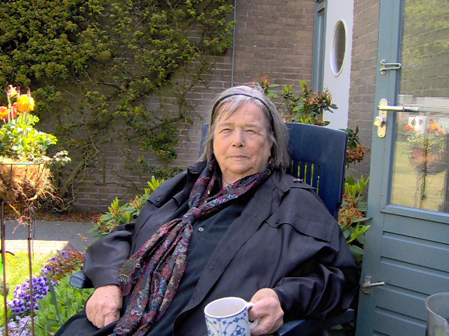 Cobi Schreier in de tuin van het Rosa Spierhuis te Laren